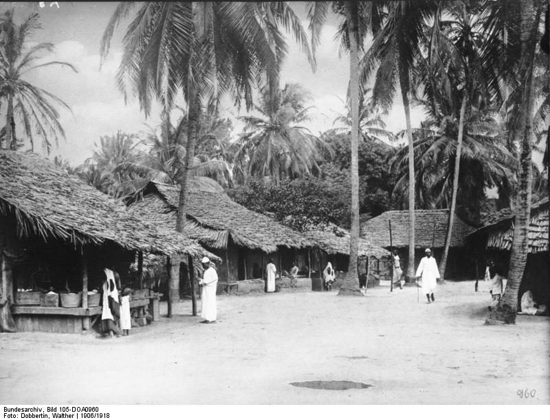 Tanga, Negerviertel